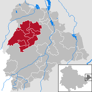 Verwaltungsgemeinschaft Rositz in Thuringia - District Altenburger Land